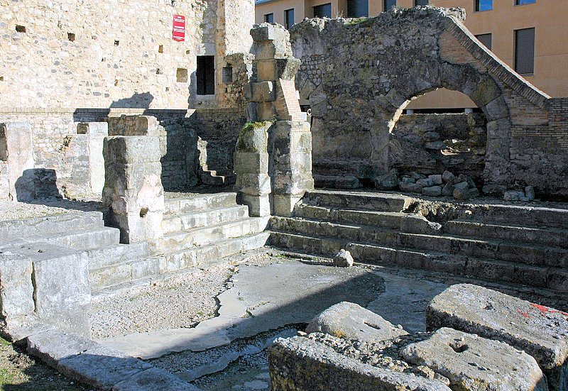 Termes Romanes, Caldes de Malavella .